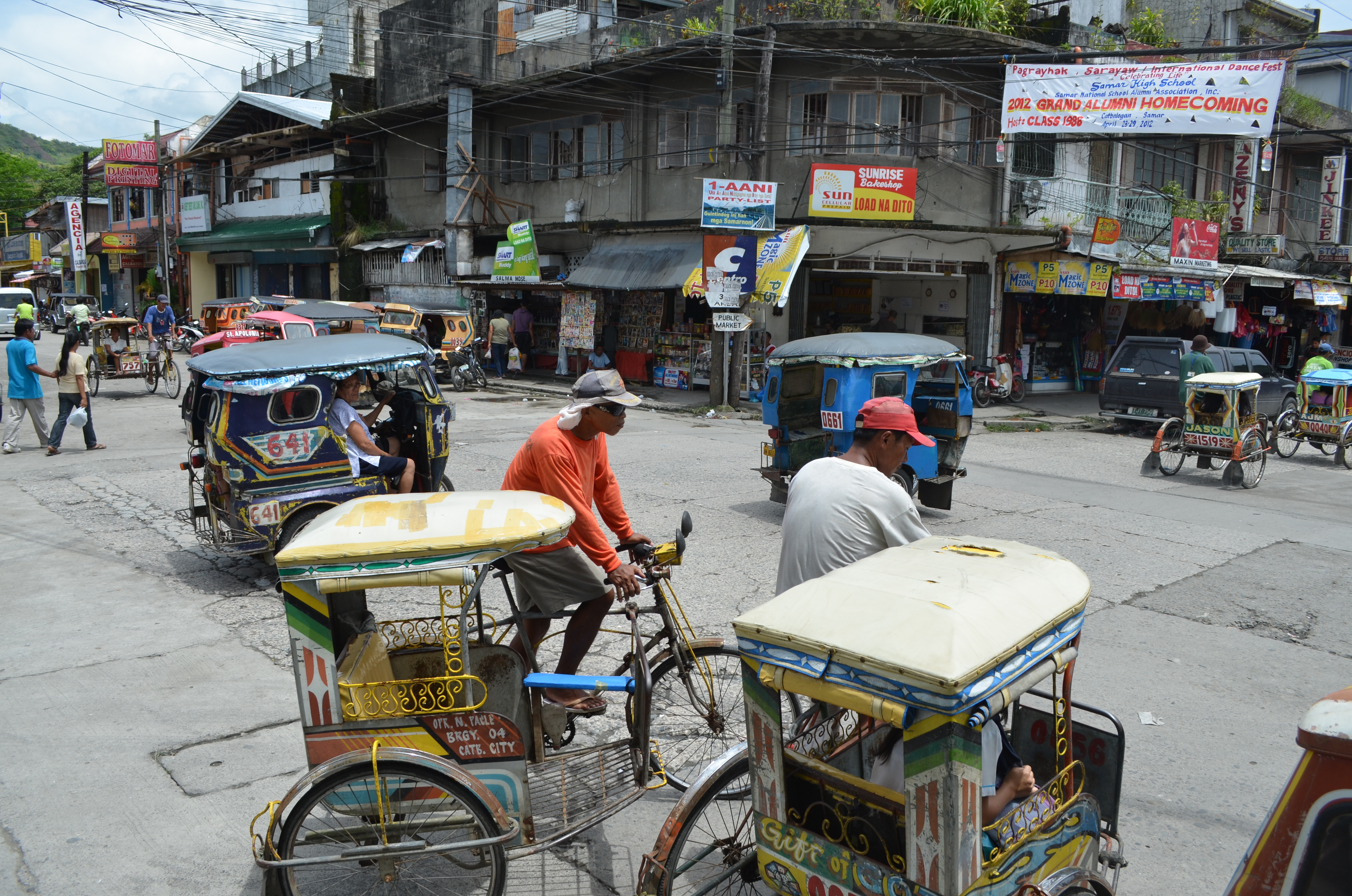 Catbalogan, Samar, Philippines